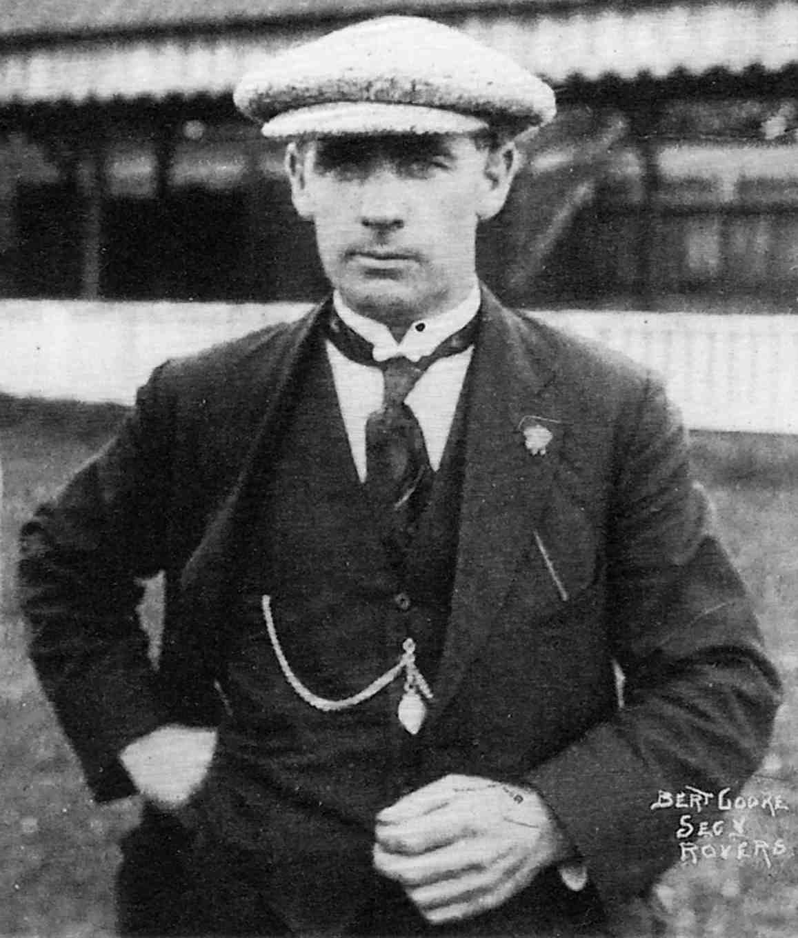 Bert Cooke in 1921